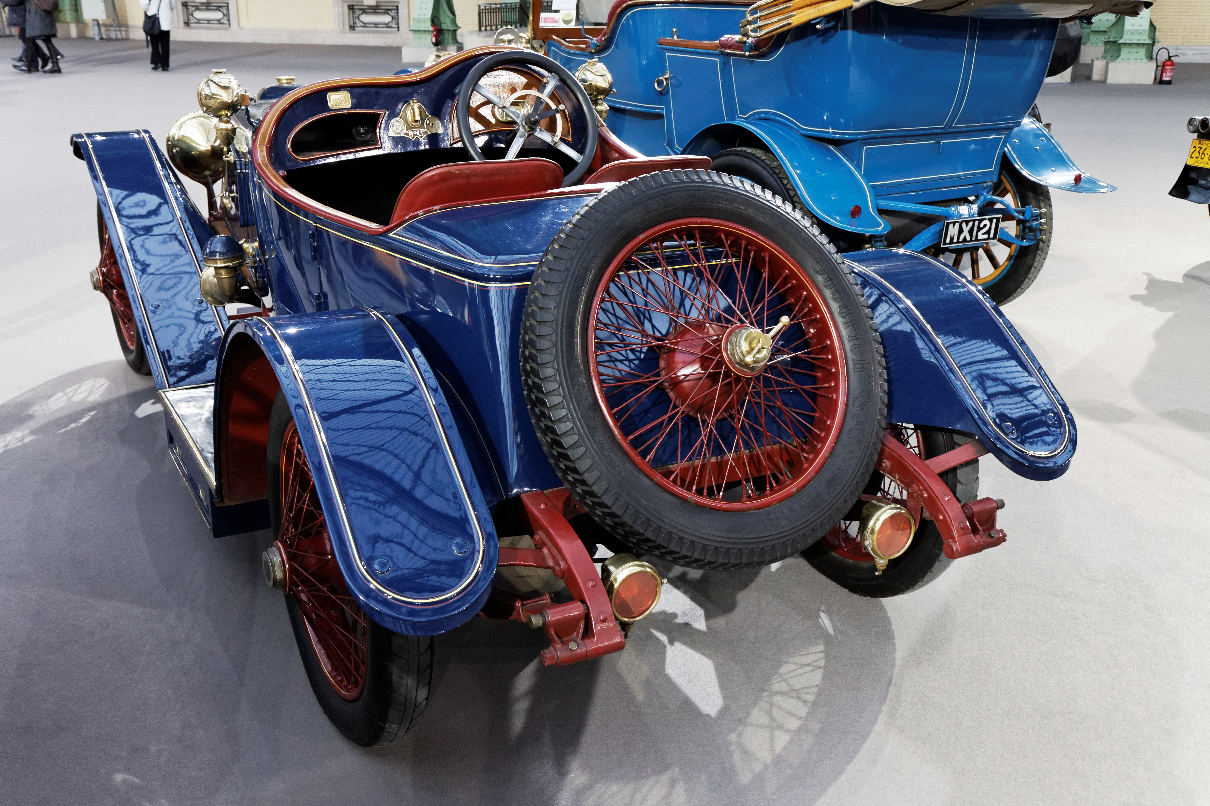 Une Mors 30HP torpédo de 1922.